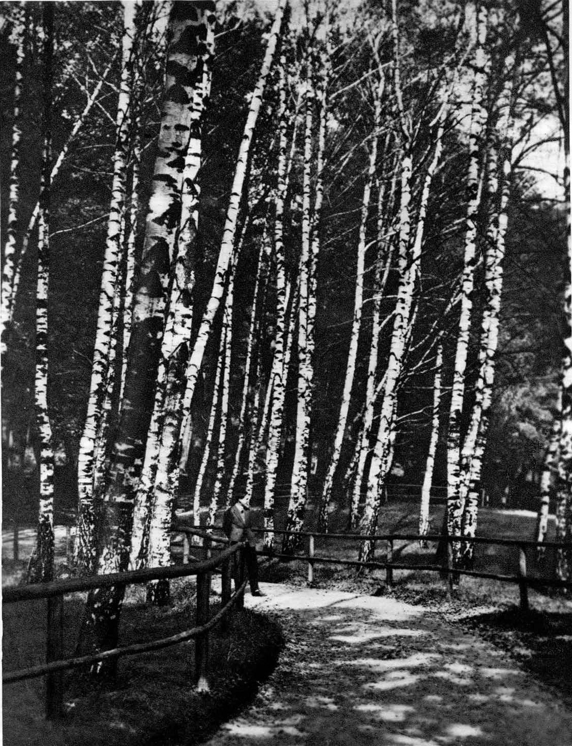 Breze v tivolskem gozdu jeseni.